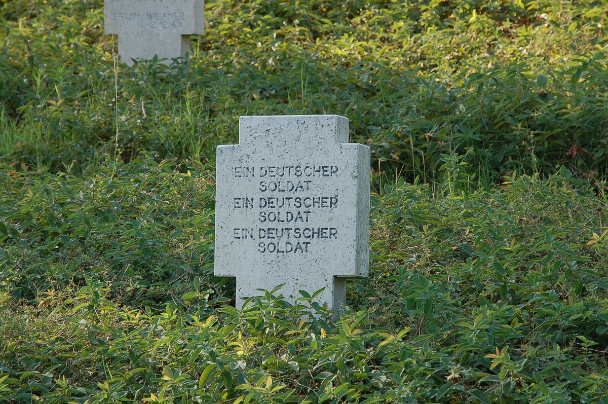 Der deutsche Soldatenfriedhof Cassino